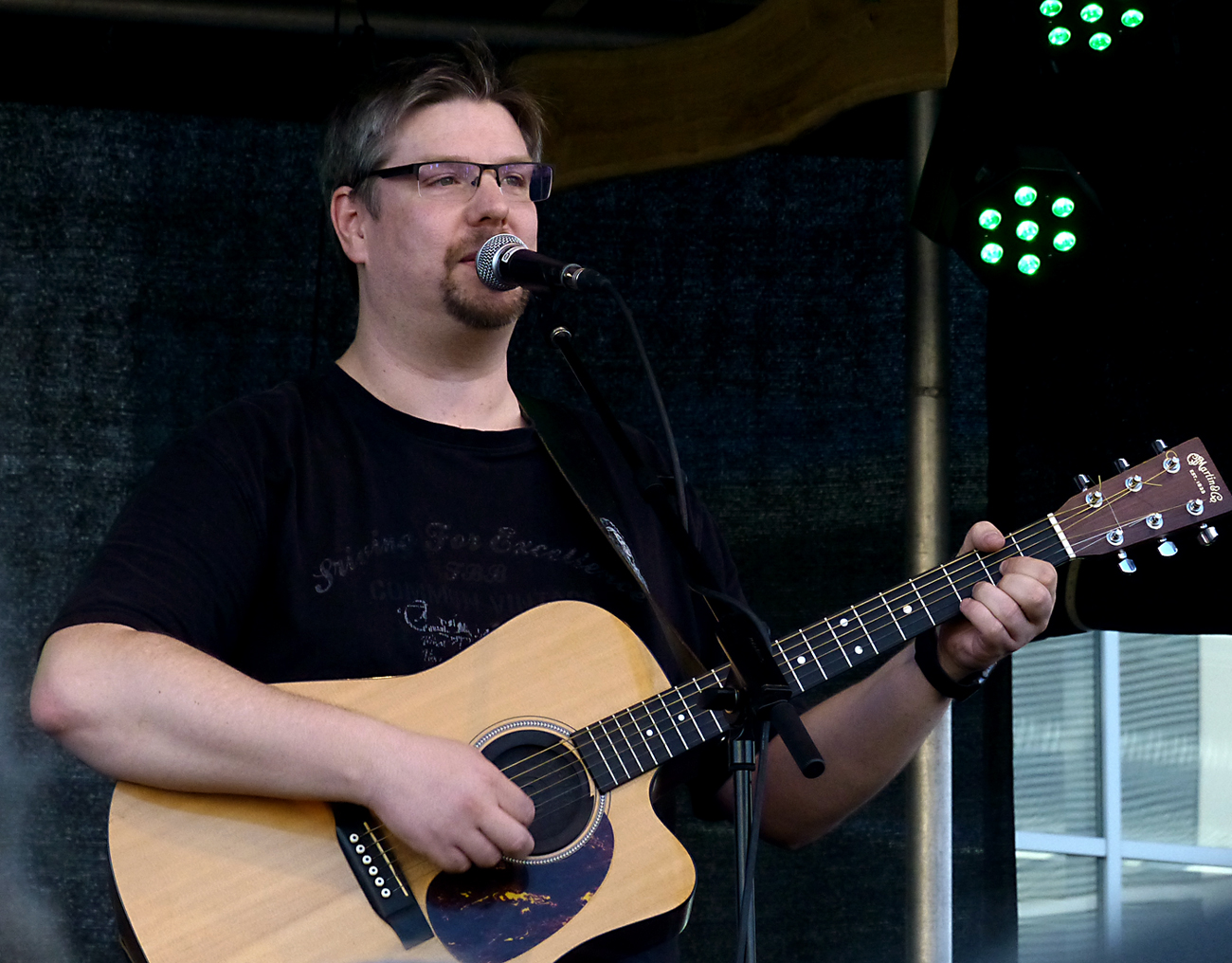 Jan Hegenberg auf der Role Play Convention in Köln, 2017.